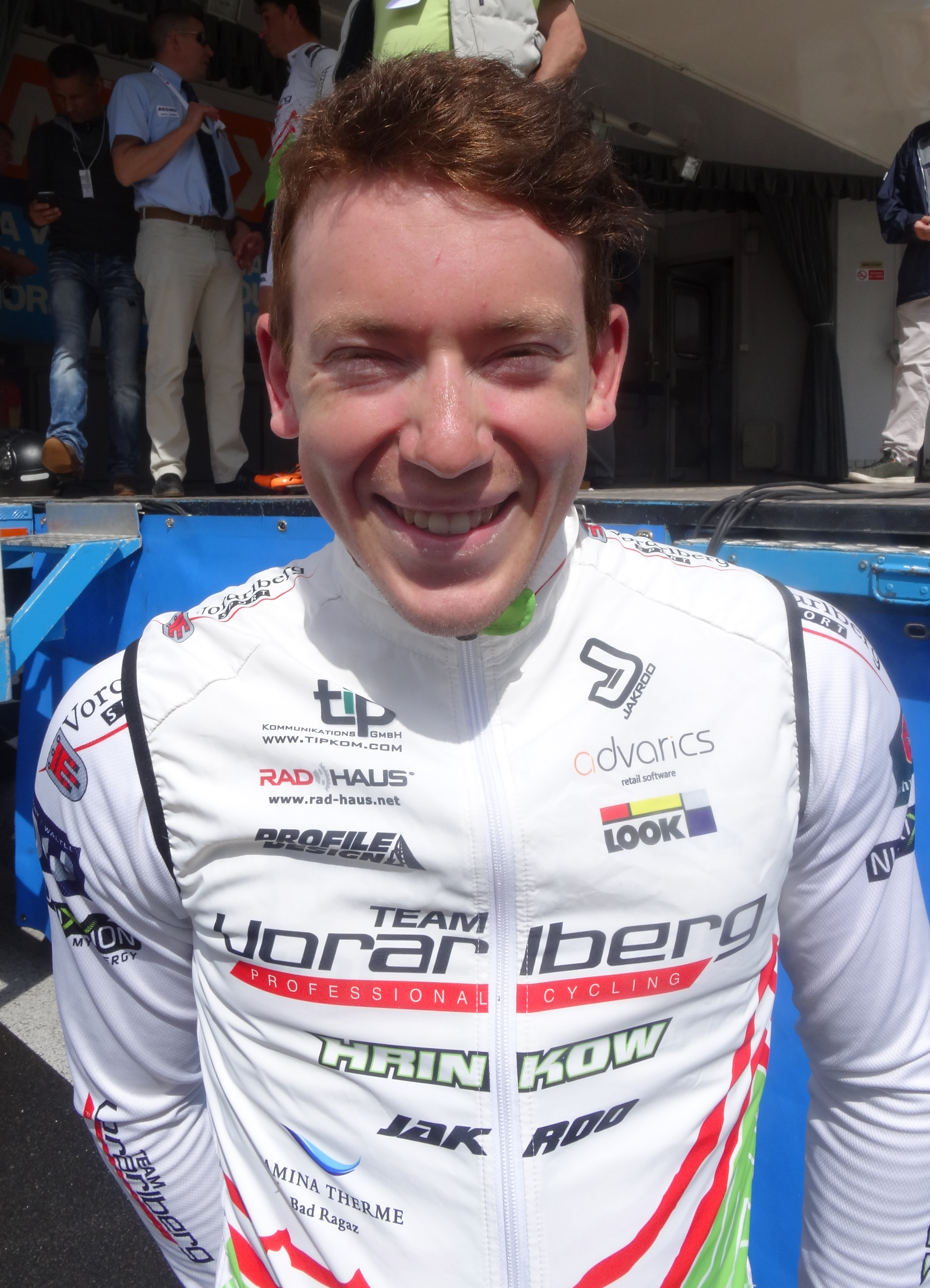 Reportage photographique réalisé le vendredi 23 mai 2014 à l'occasion du départ de la première étape du Paris-Arras Tour 2014 à Lens, Pas-de-Calais, Nord-Pas-de-Calais, France. Depicted person: Fabian Schnaidt